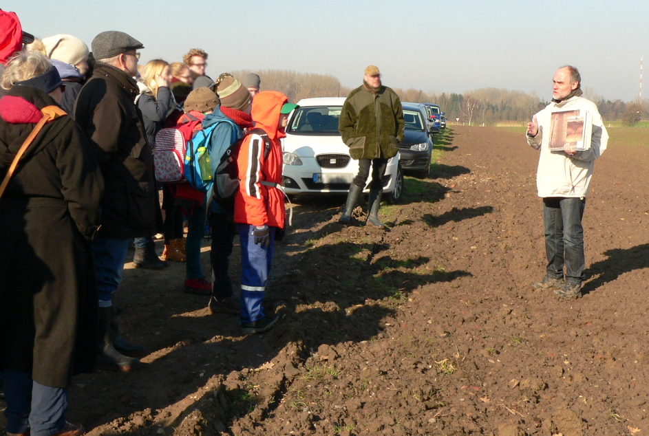 Führung am Gelände des römischen Marschlagers von Wilkenburg durch die Römer Arbeitsgemeinschaft Leine, die Numismatische Gesellschaft zu Hannover und das Niedersächsisches Landesamt für Denkmalpflege